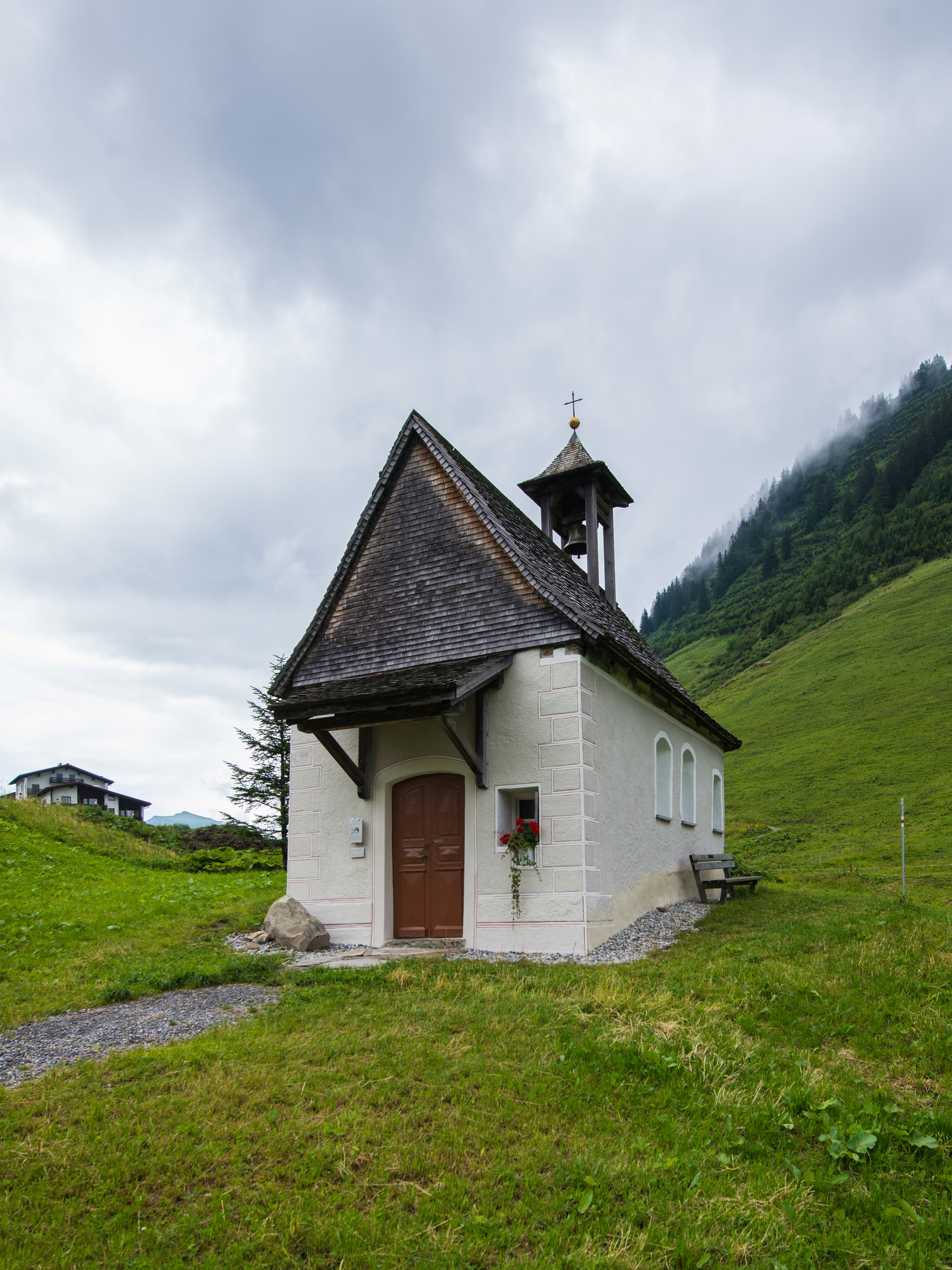 Kapelle Hl. Anna in Fontanella - Faschina. Der Steilhang im Hintergrund gehört zum Sonnenköpfle. aus dem DEHIO Vorarlberg 1983: Um 1700 als Stiftung von Dr. Josef Hartmann (später 1717-1720 Bürgermeister von Wien) erbaut. 1951/52 Restauriert. Rechteckbau mit Rundapsis unter gemeinsamem Satteldach und Glockendachreiter im Osten. Im Westen Vorzeichen mit Pultdach auf 2 Stützen, beschindelte Westgiebelfassade. Flachgedeckter Betraum mit Holzfelderdecke, eingezogener rundbogiger Chorbogen, Chorraum mit Wölbung. Barocker Altaraufbau um 1700, Altarbild hl. Anna mit Maria, Erstes 19. Jh., Figuren Hll. Maria mit Kind, Nikolaus, Andreas deponiert. Über dem Chorbogen Akanthuskartusche mit Relief Gottvater um 1700. Dieses Bild wurde anlässlich des österreichischen Tags des Denkmals 2016 in Vorarlberg eingereicht.